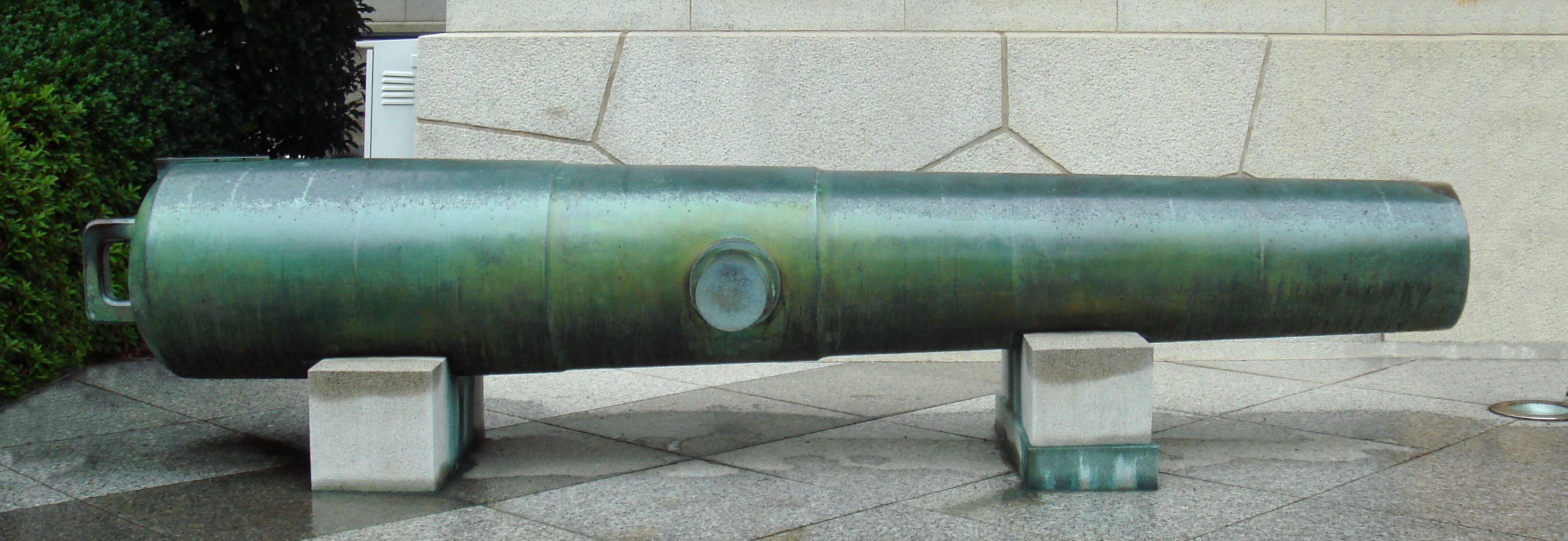 Satsuma_150_pound_cannon_1849. Yasukuni shrine.